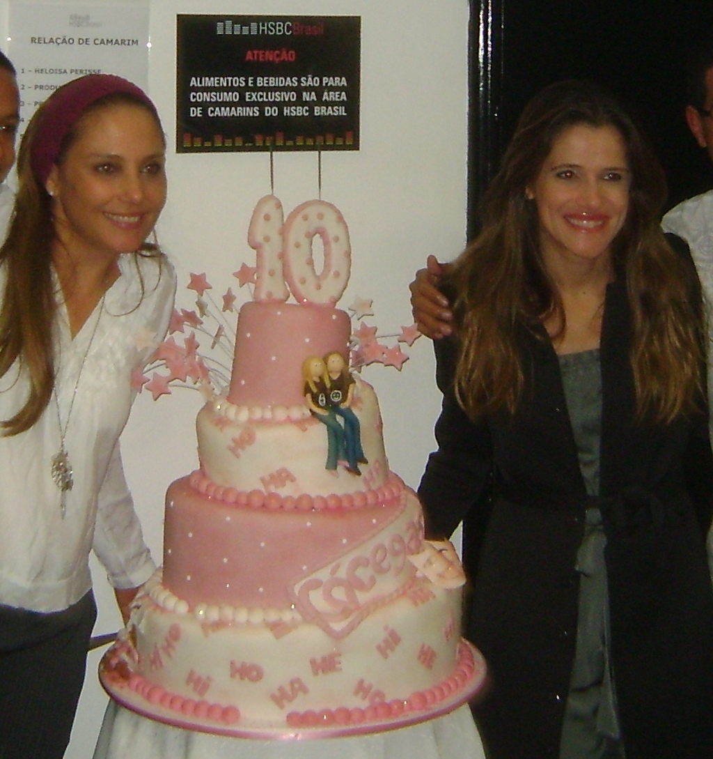 Heloísa Périssé e Ingrid Guimarães, atrizes e humoristas brasileiras, comemorando os dez anos em cartaz da peça "Cócegas", em São Paulo.